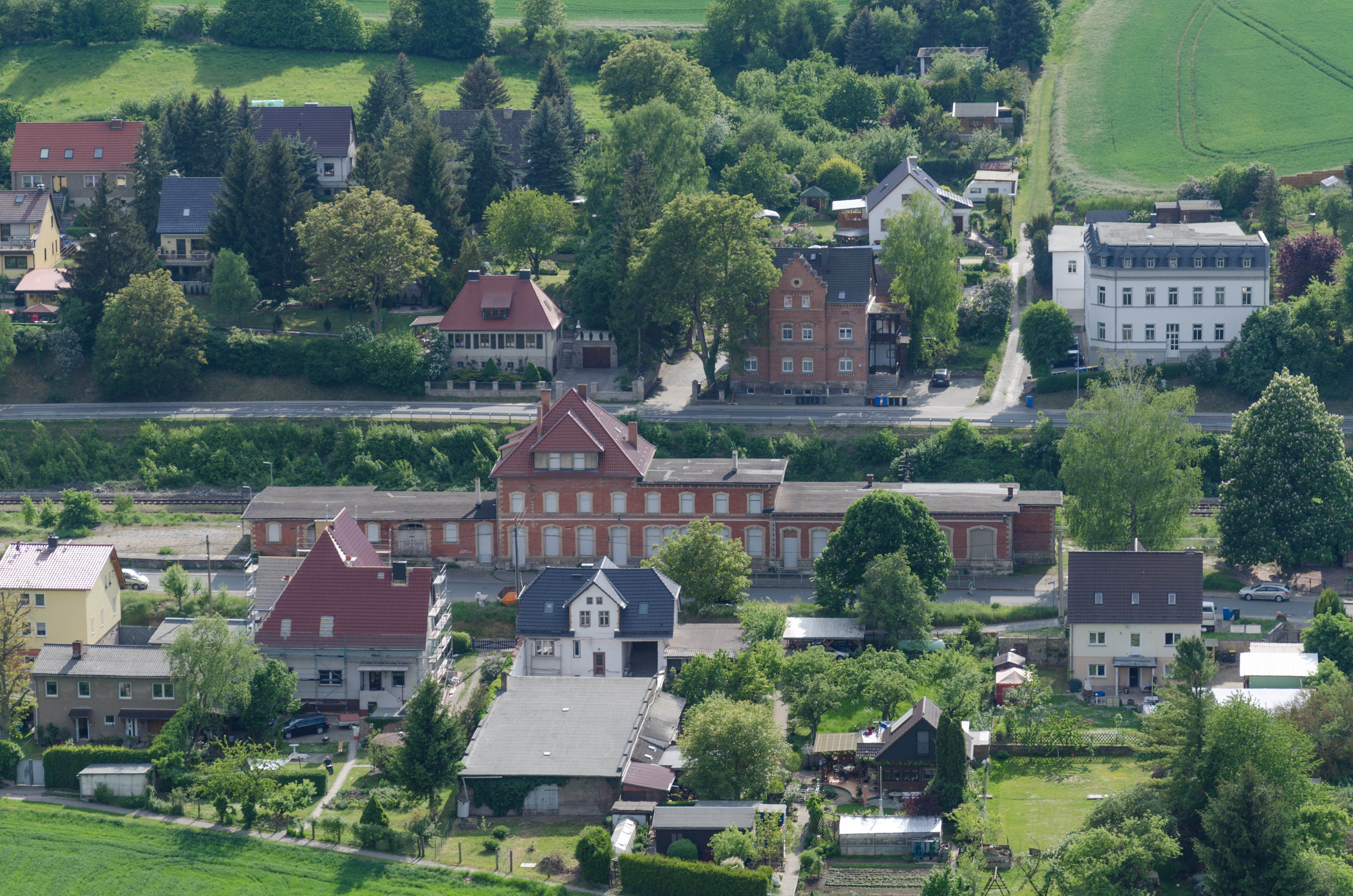 Freyburg an der Unstrut, Bahnhofstraße 1, Bahnhof